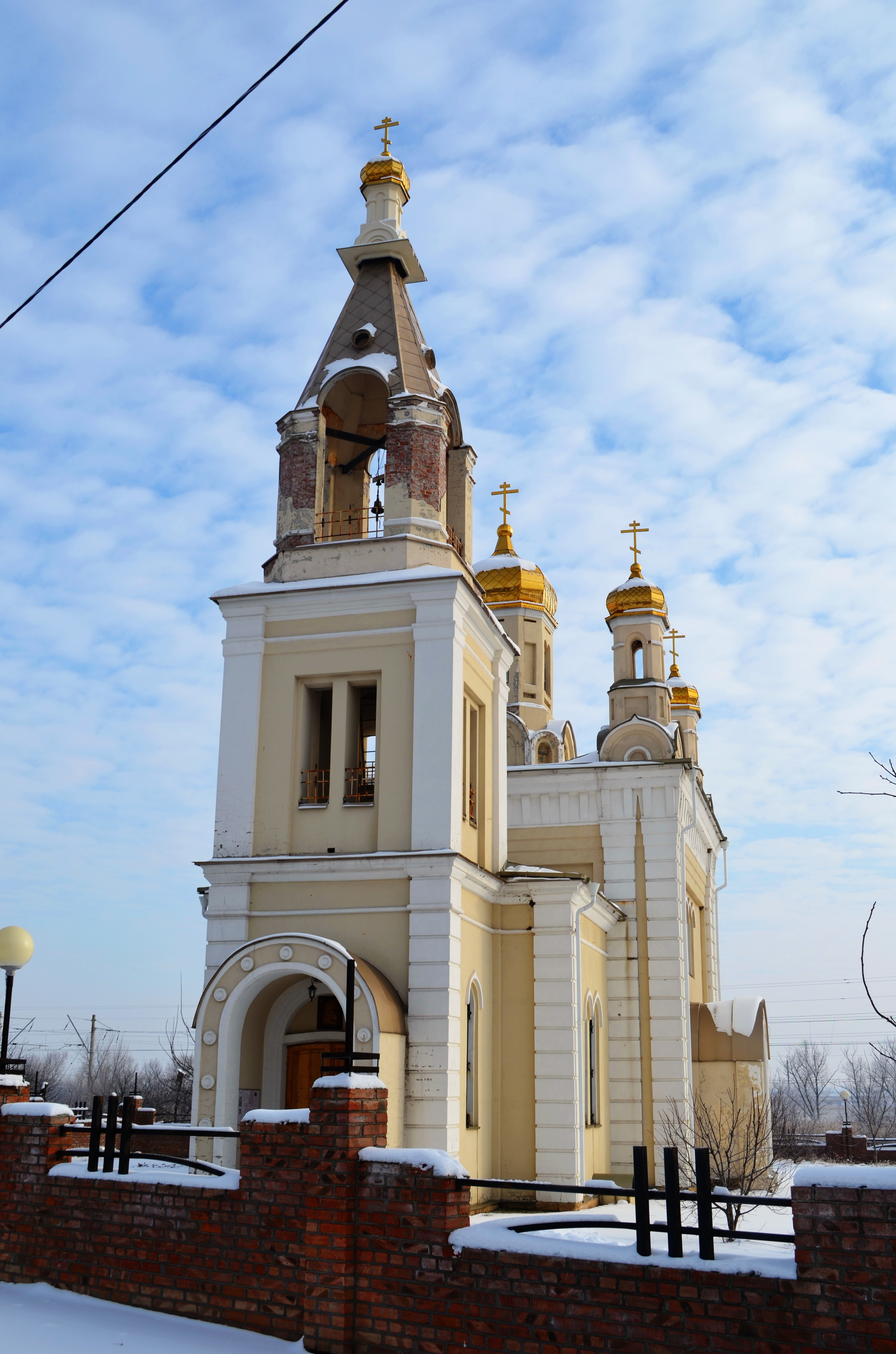 Домовая церковь Рождества Богородицы (усыпальница М.И. Платова): Малый Мишкин, Аксайский район, Ростовская область